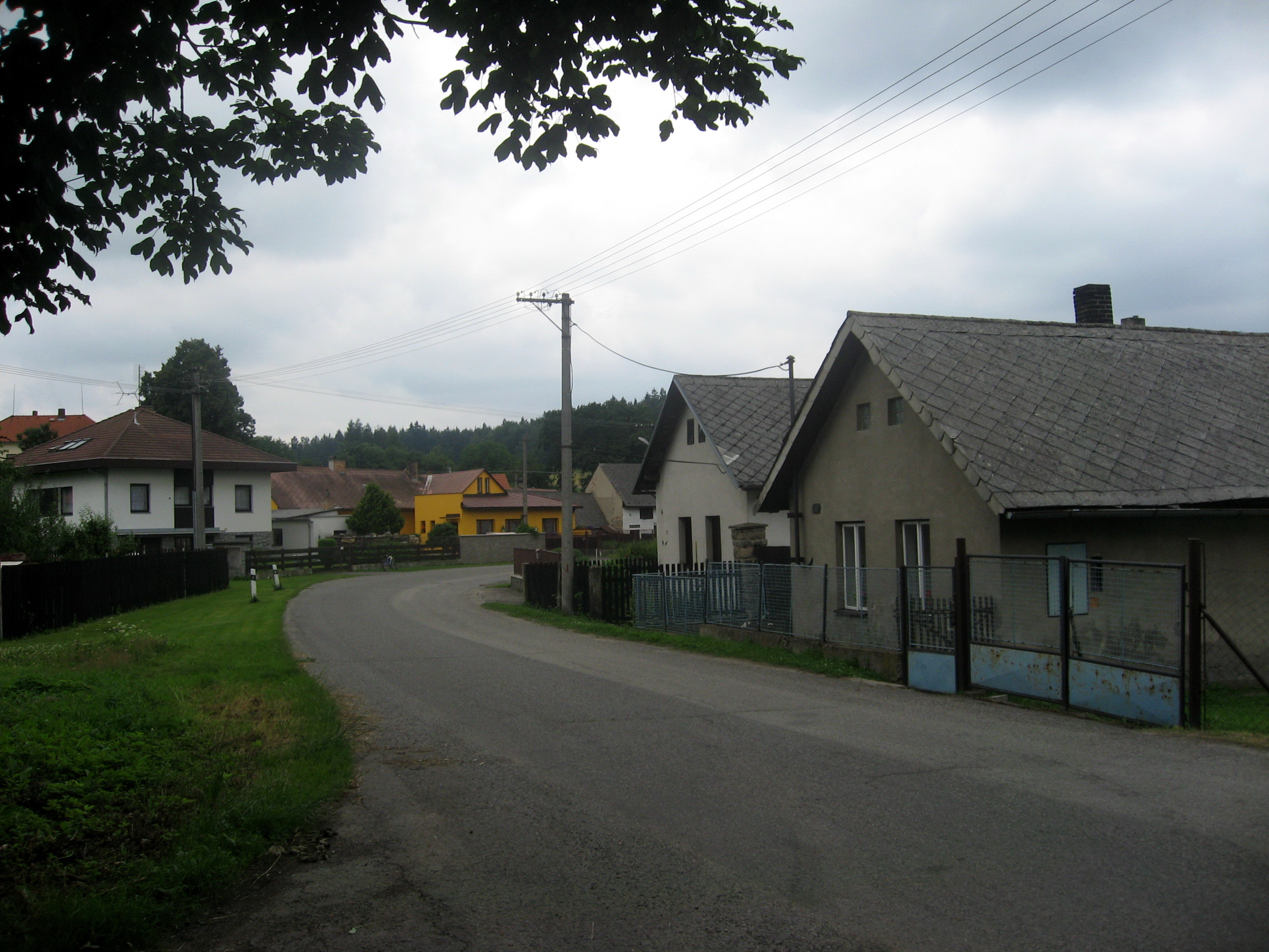 Kamenice, součást obce Herálec